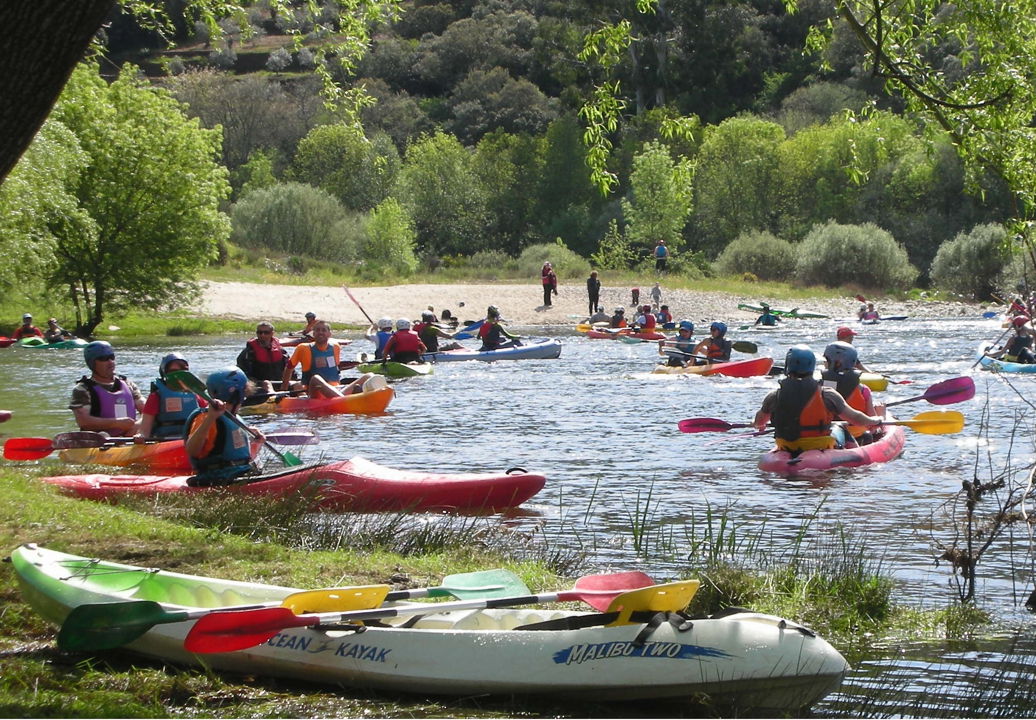 Descente en canoë du Rio Alagon sur la commune de Sotoserrano en Espagne